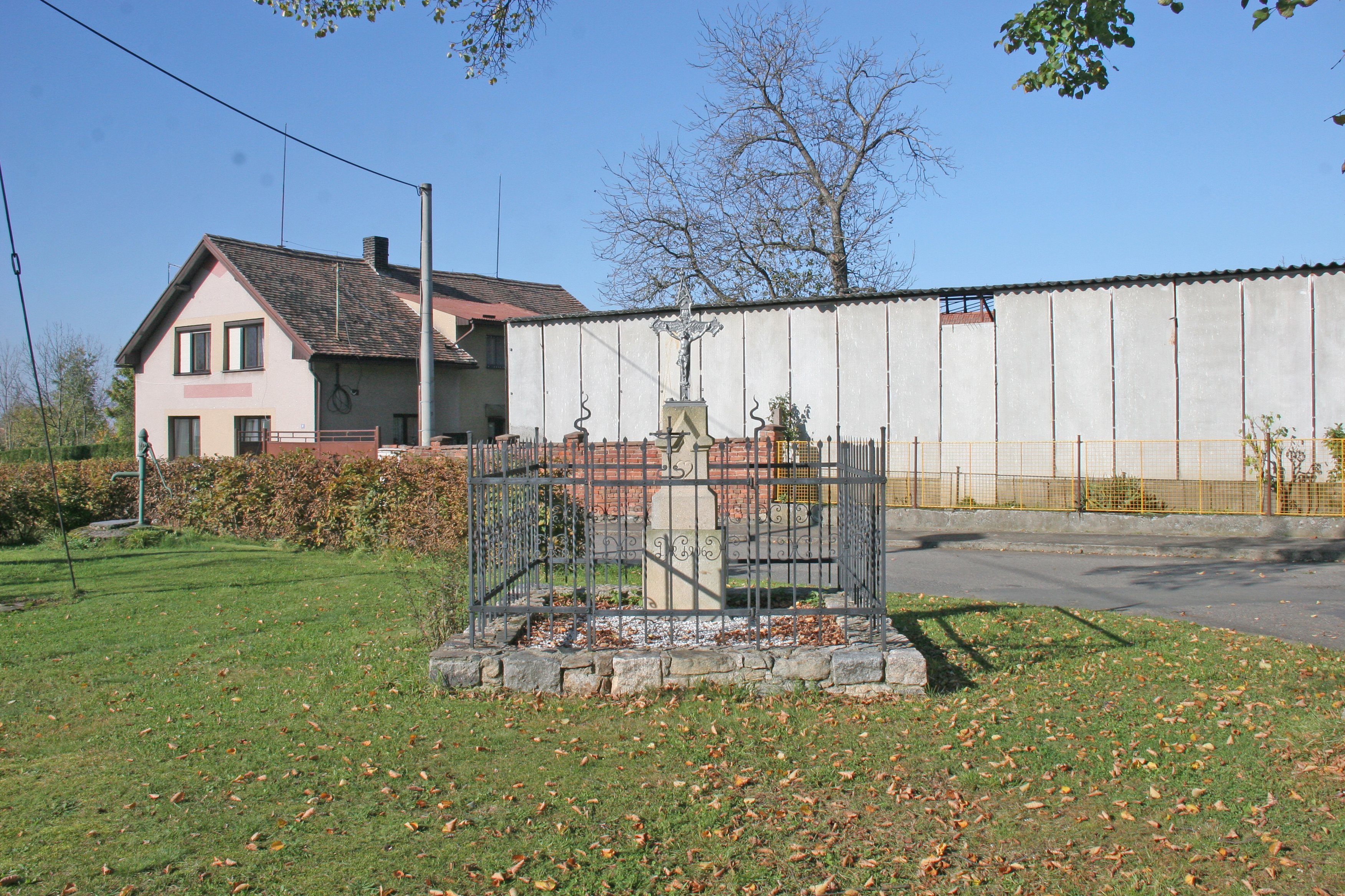 Lipovec křížek